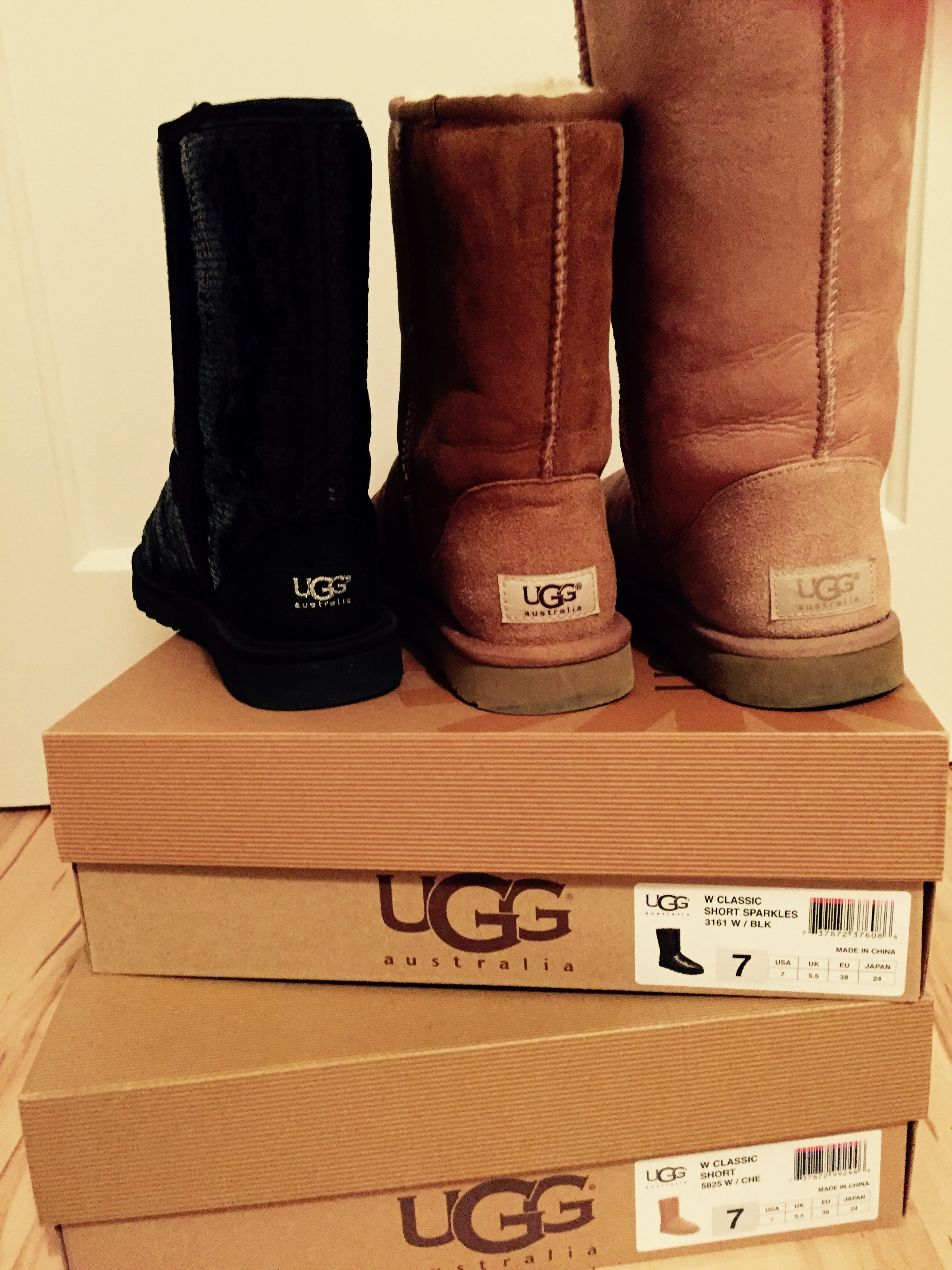 Ugg škornji znamke Deckers Outdoor Corporation.